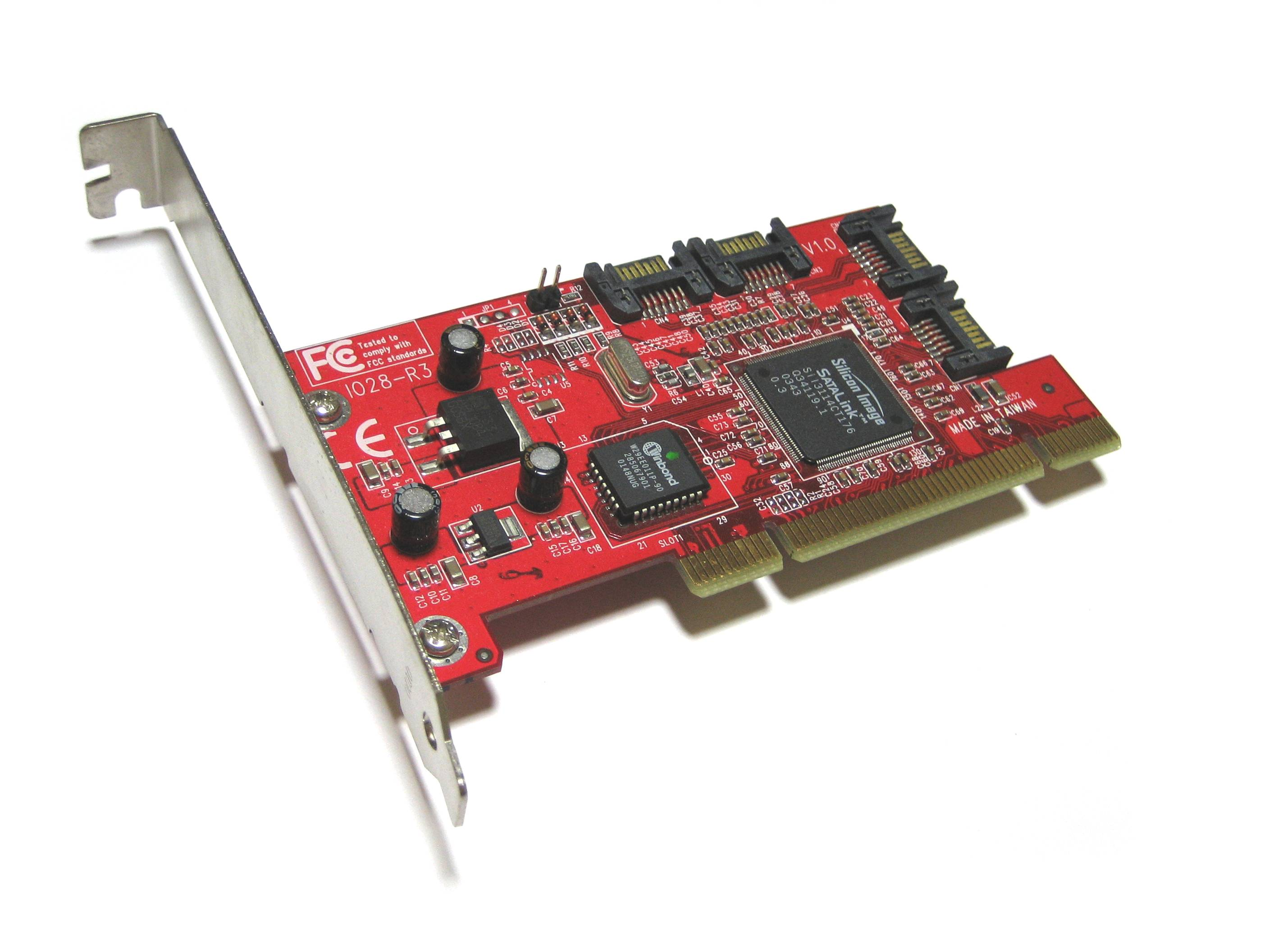 SATARAID4P-PCI, a PCI SATA RAID card